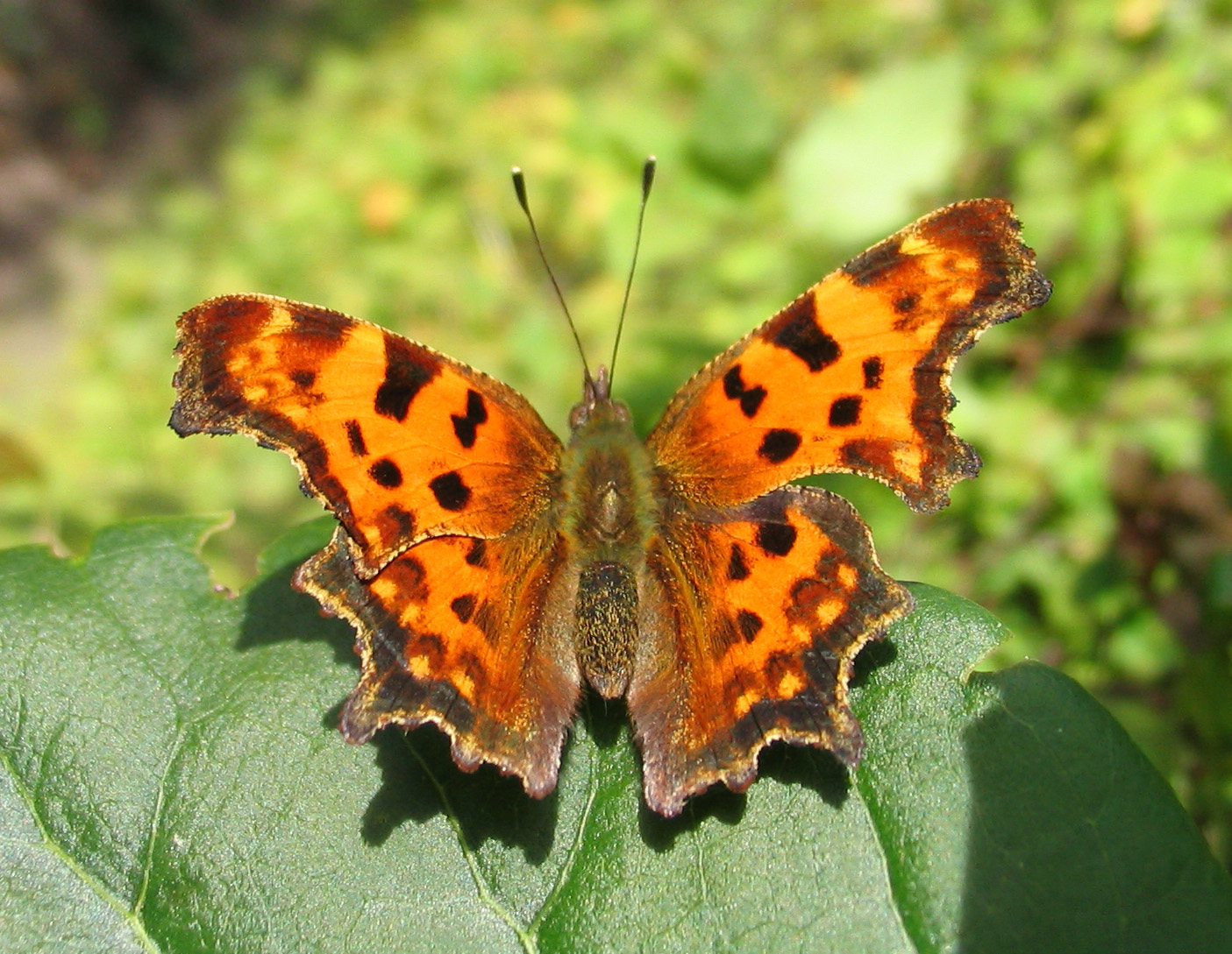 Beschreibung: C-Falter (Polygonia C-album) Fotograf: Darkone, 18. September 2004